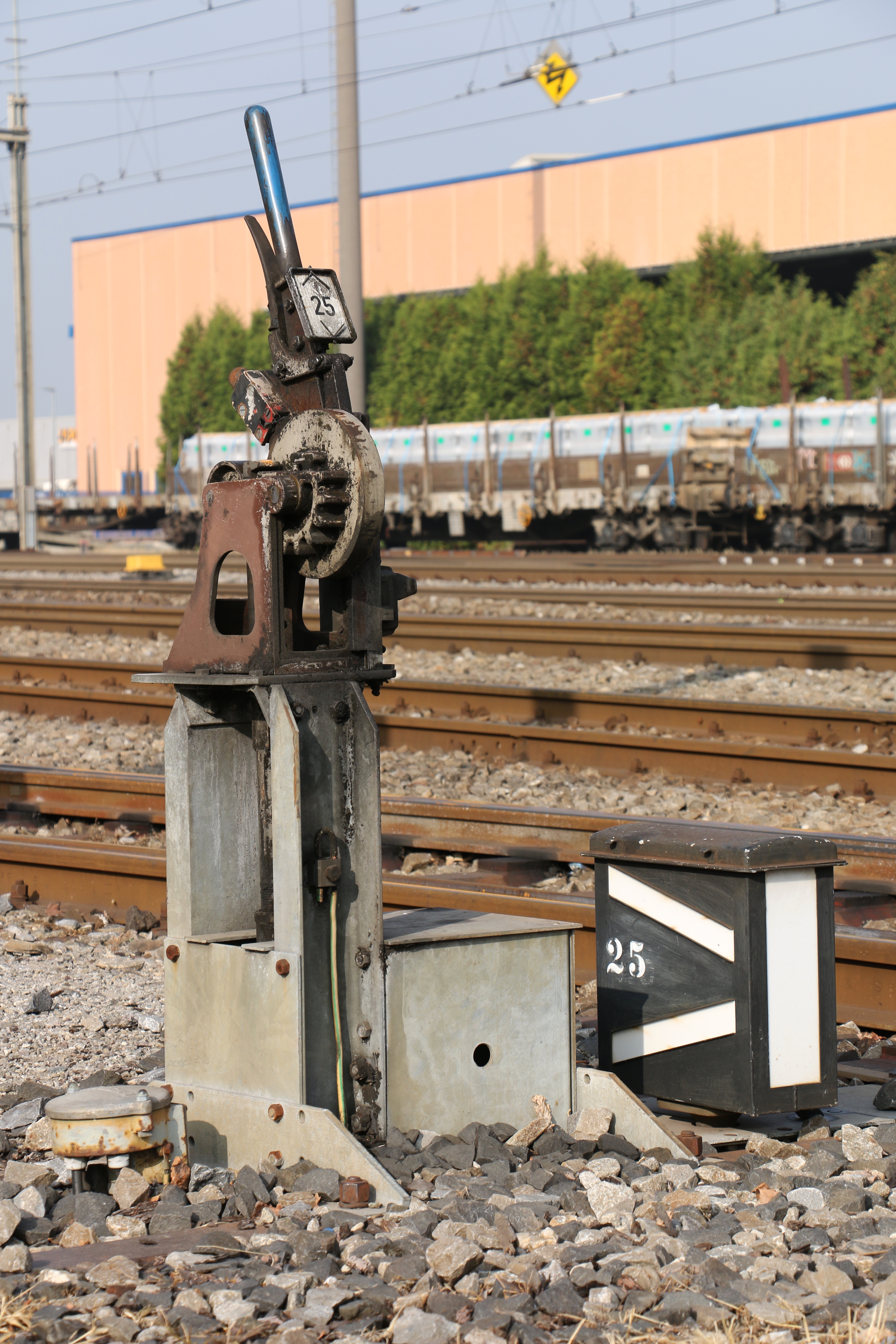 Handstelleinrichtung einer ortsbedienten Weiche in schweizer Ausführung mit einem mechanischen Gestängeweichenhebel Bauform Bruchsal G